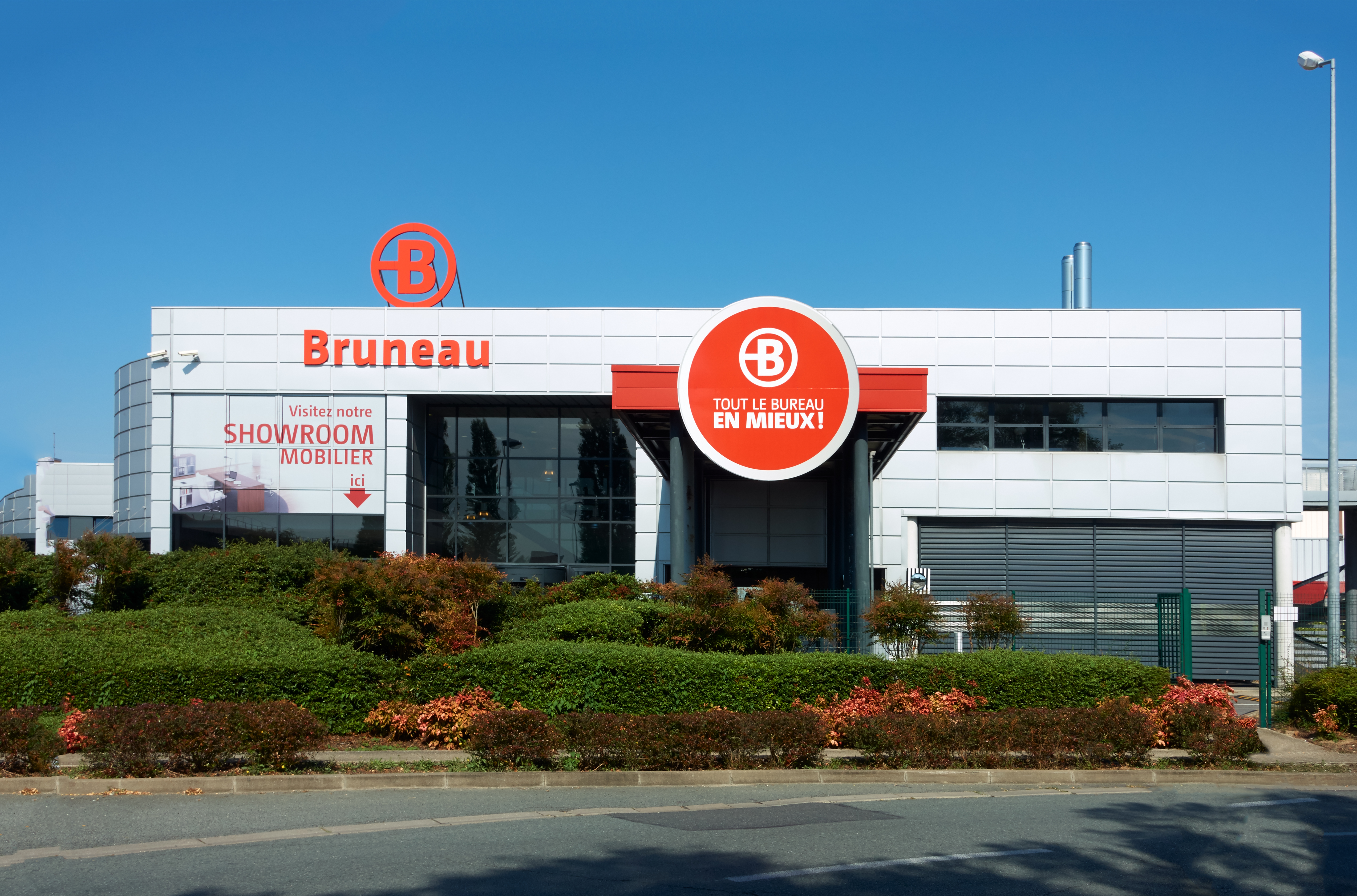 Bât 18